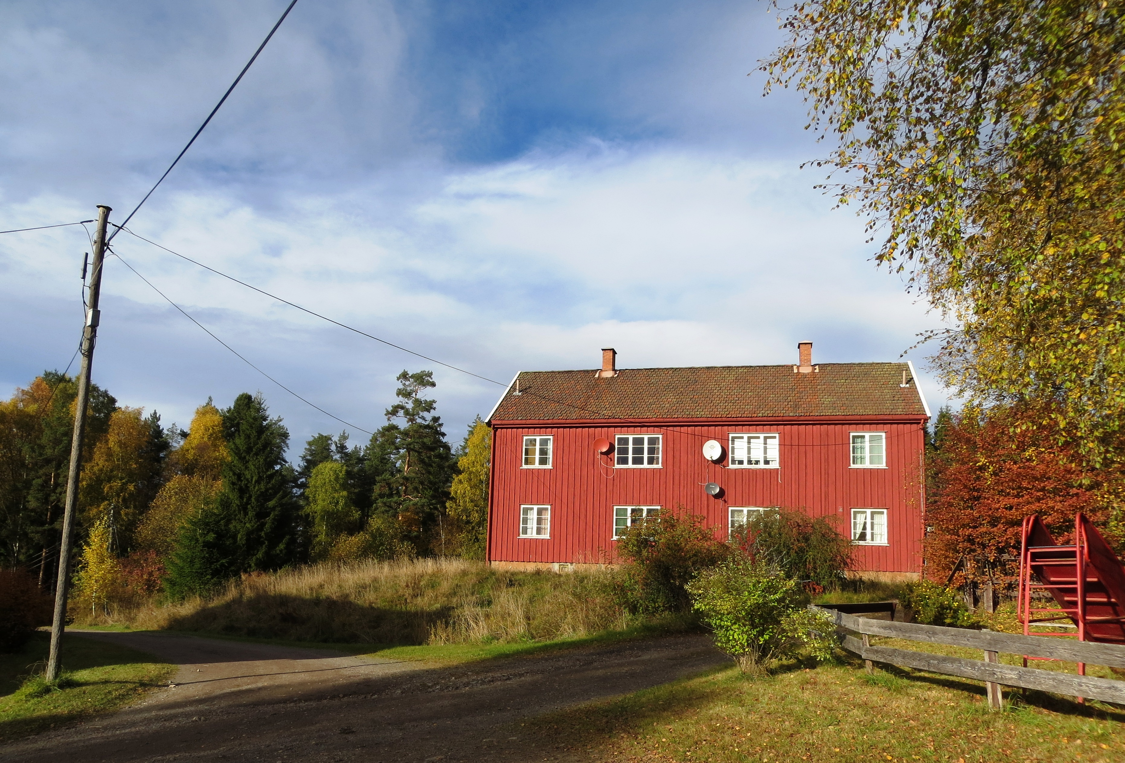 Husmannsplassen / gården Strømsbråten ligger sentralt på Bogstad i landbruksområdet "Hestehagan" - mellom Bogstad Gård og marka. Strømsbråten omfatter det staselige landemerket "Markalåven".